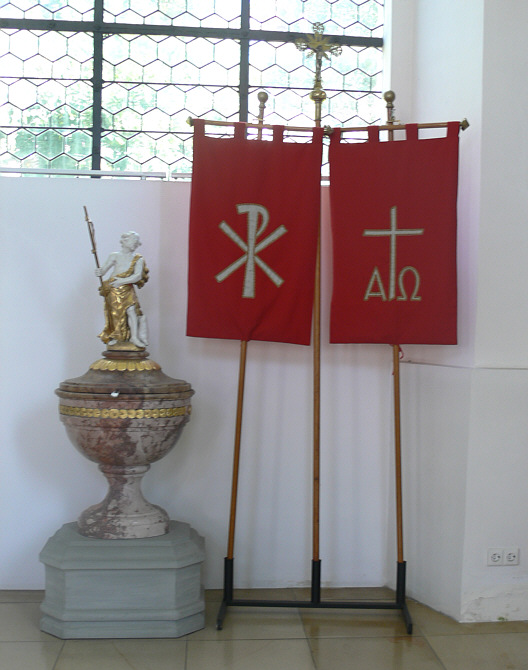 Pfarrkirche St. Verena, Bad Wurzach, Landkreis Ravensburg Taufstein unbd Kirchenfahnen